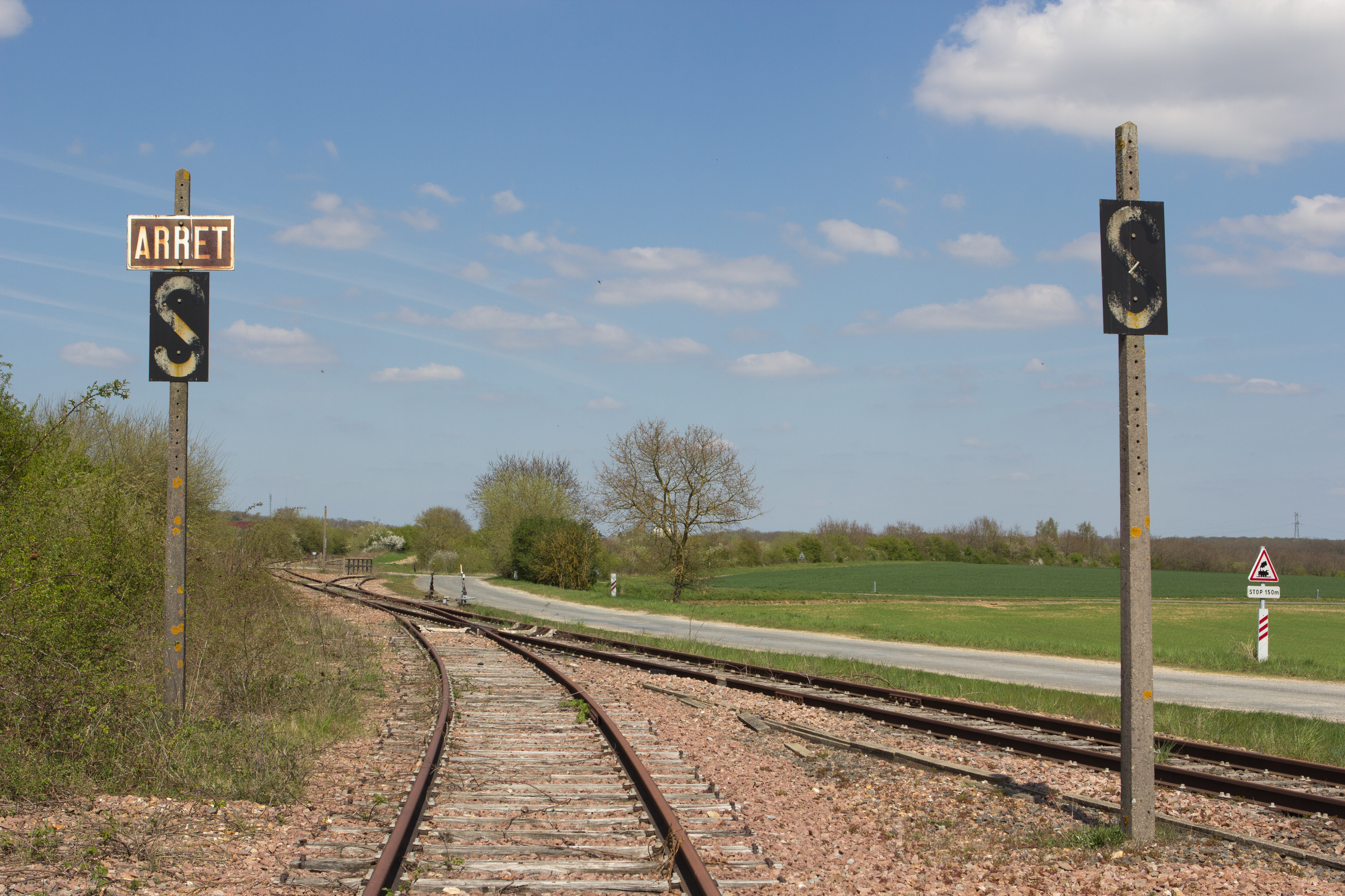 Ligne de Bourron-Marlotte à Malesherbes / Raccordement de Filay / Raccordement sud à la ligne Villeneuve-St-Georges à Montargis / Vue vers le nord en direction de Malesherbes ou de Bourron-Marlotte / Commune du Coudray, Loiret, France